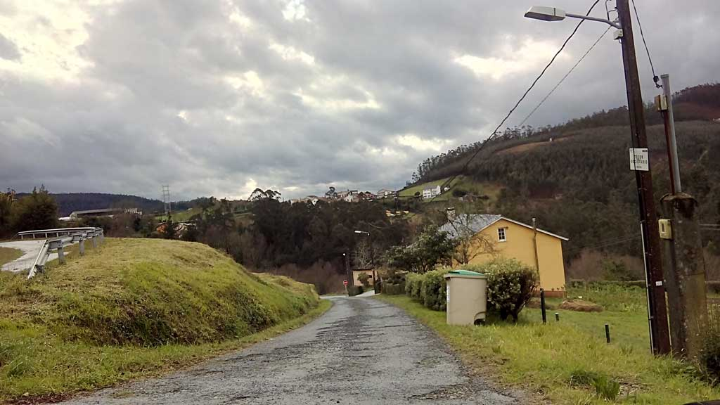 Vista do Pouso, Doso, Narón.